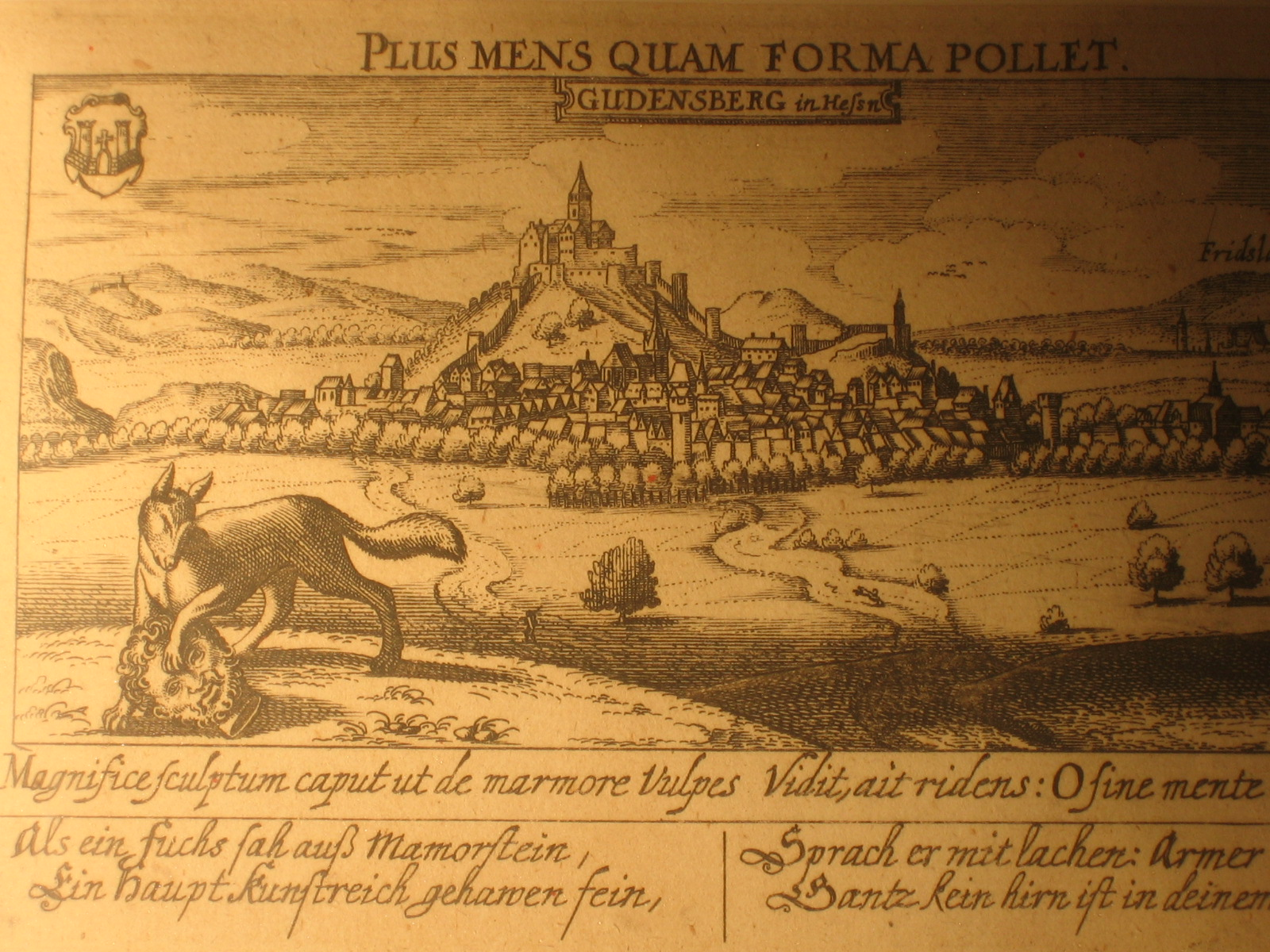 Repruduktion eines Kupferstichs von Mathias Merian von Gudensberg, Aufnahme aus einer privaten Kunstsammlung